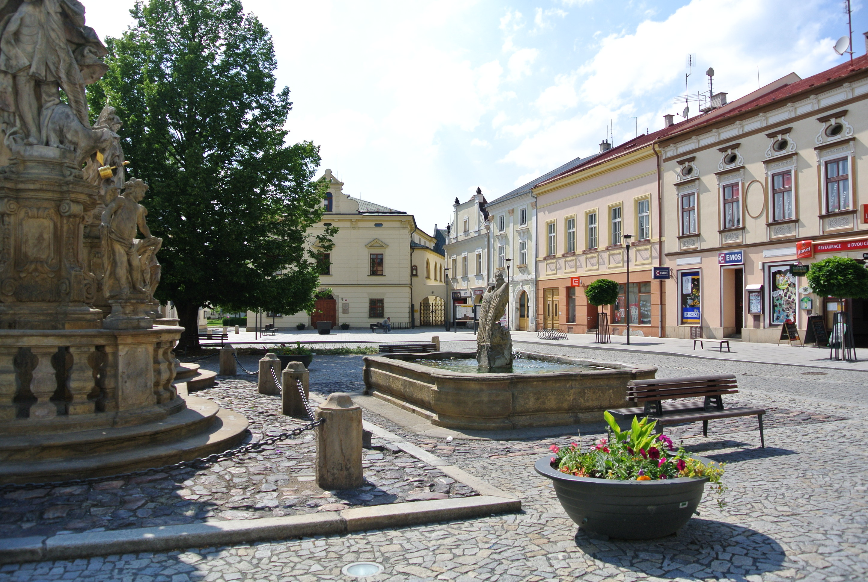 Masarykovo náměstí,Uničov